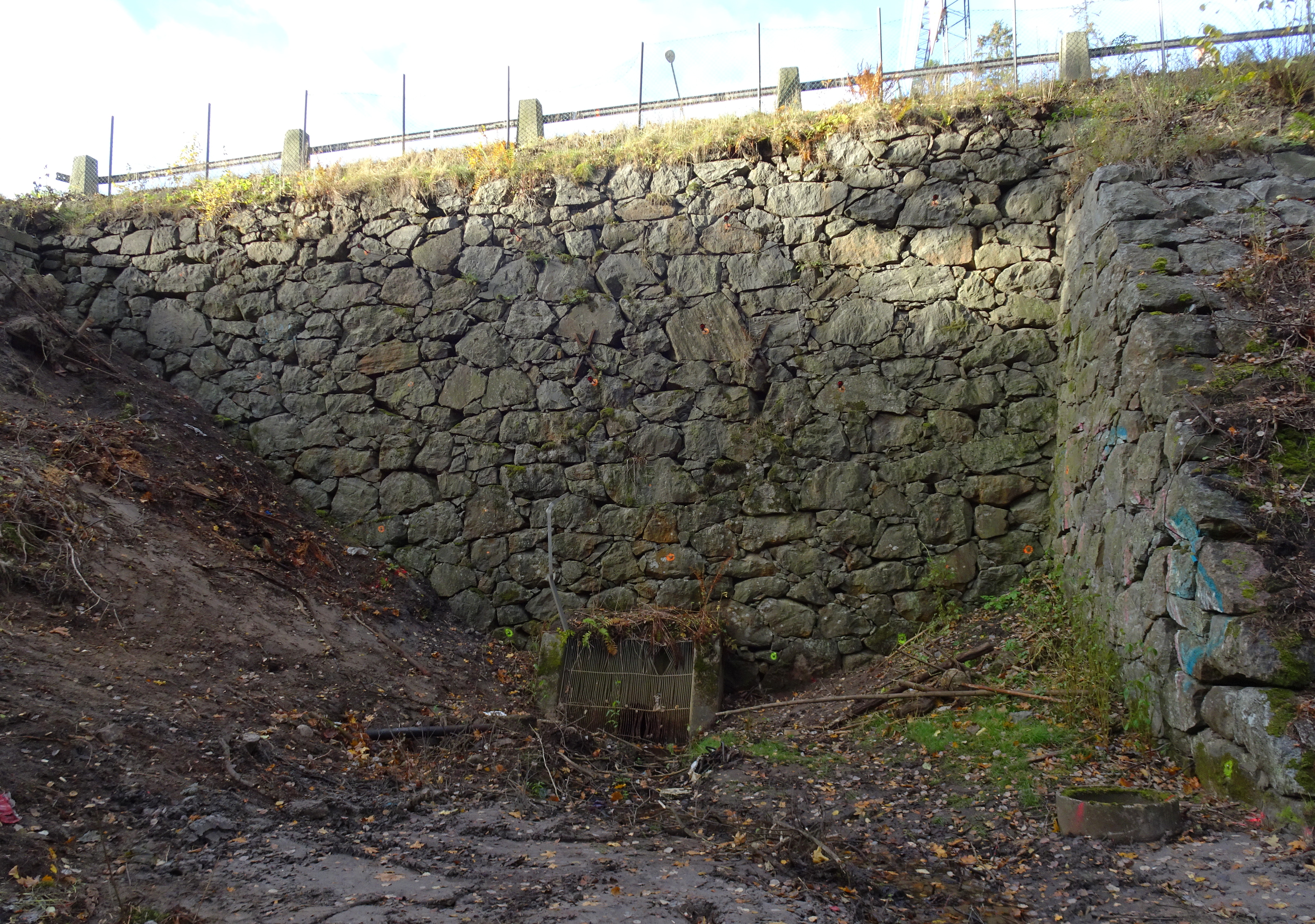 Gamla Södertäljevägen Vårbybacken, stödmur vid Gömmarravinen